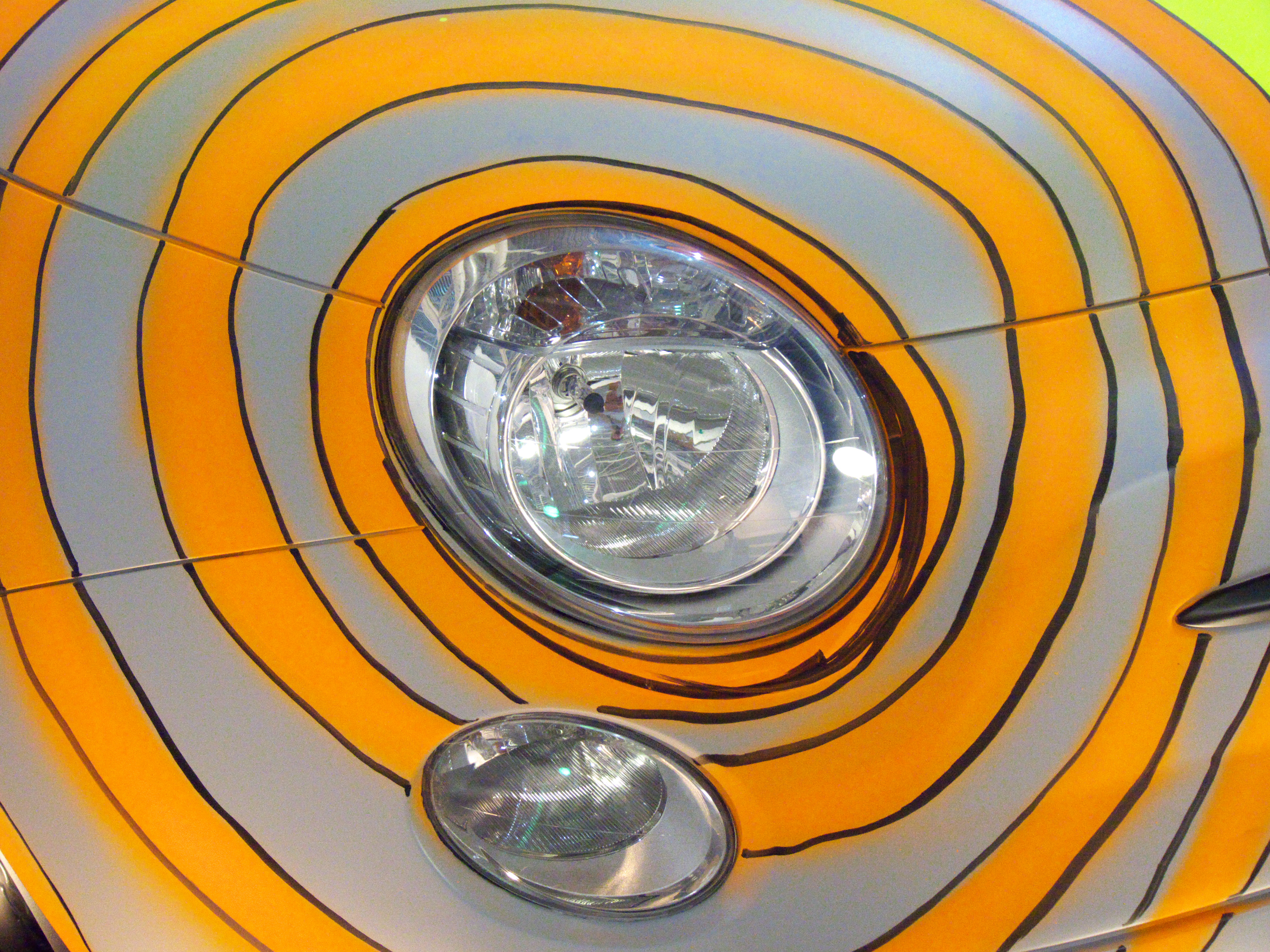 500, Tobias Rehberger, Artissima 17